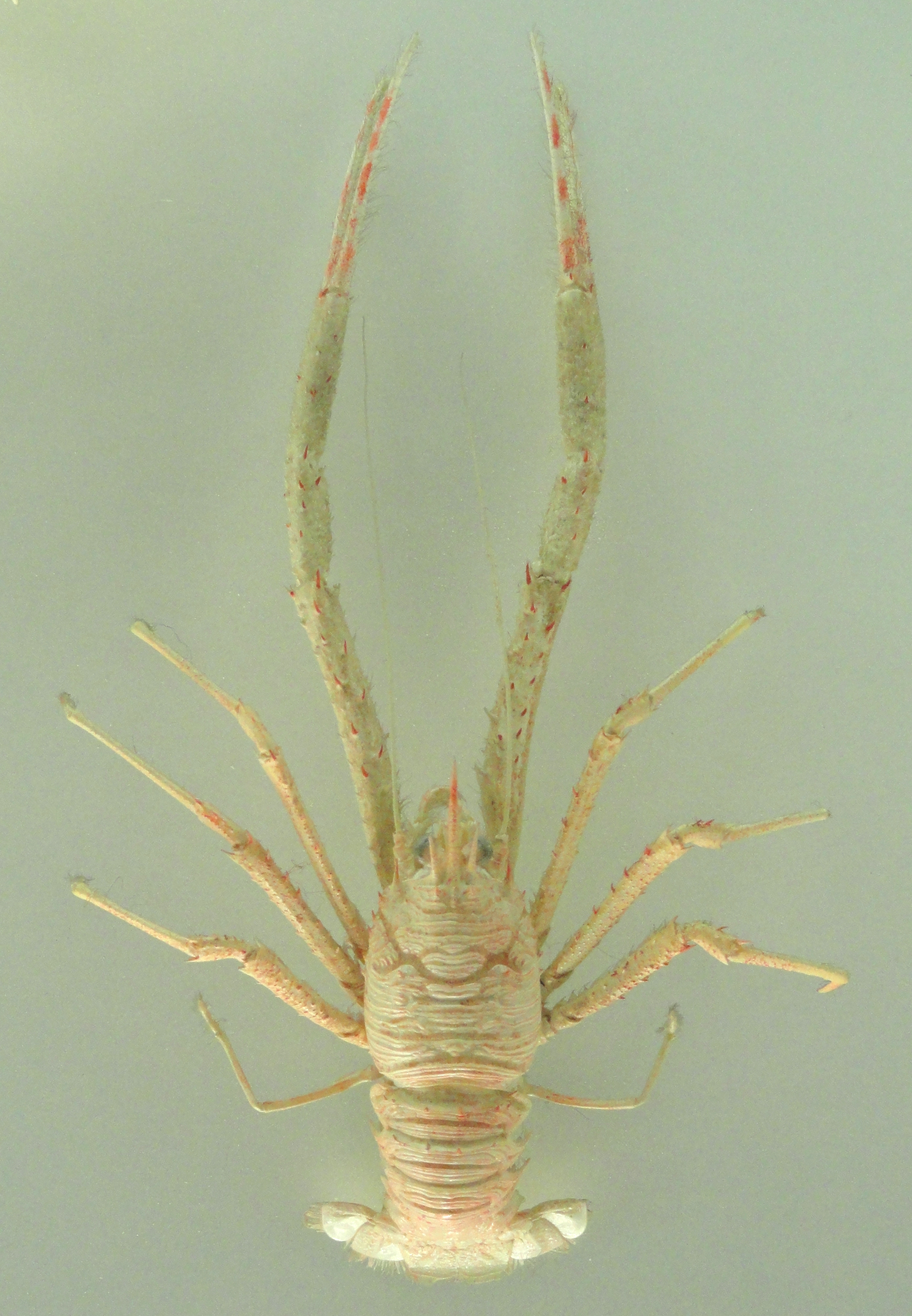 Exhibit in Naturmuseum Senckenberg, Frankfurt am Main, Germany.